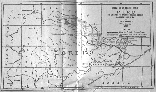 Territorio cedido a Colombia por Perú mediante el Tratado Salomón-Lozano